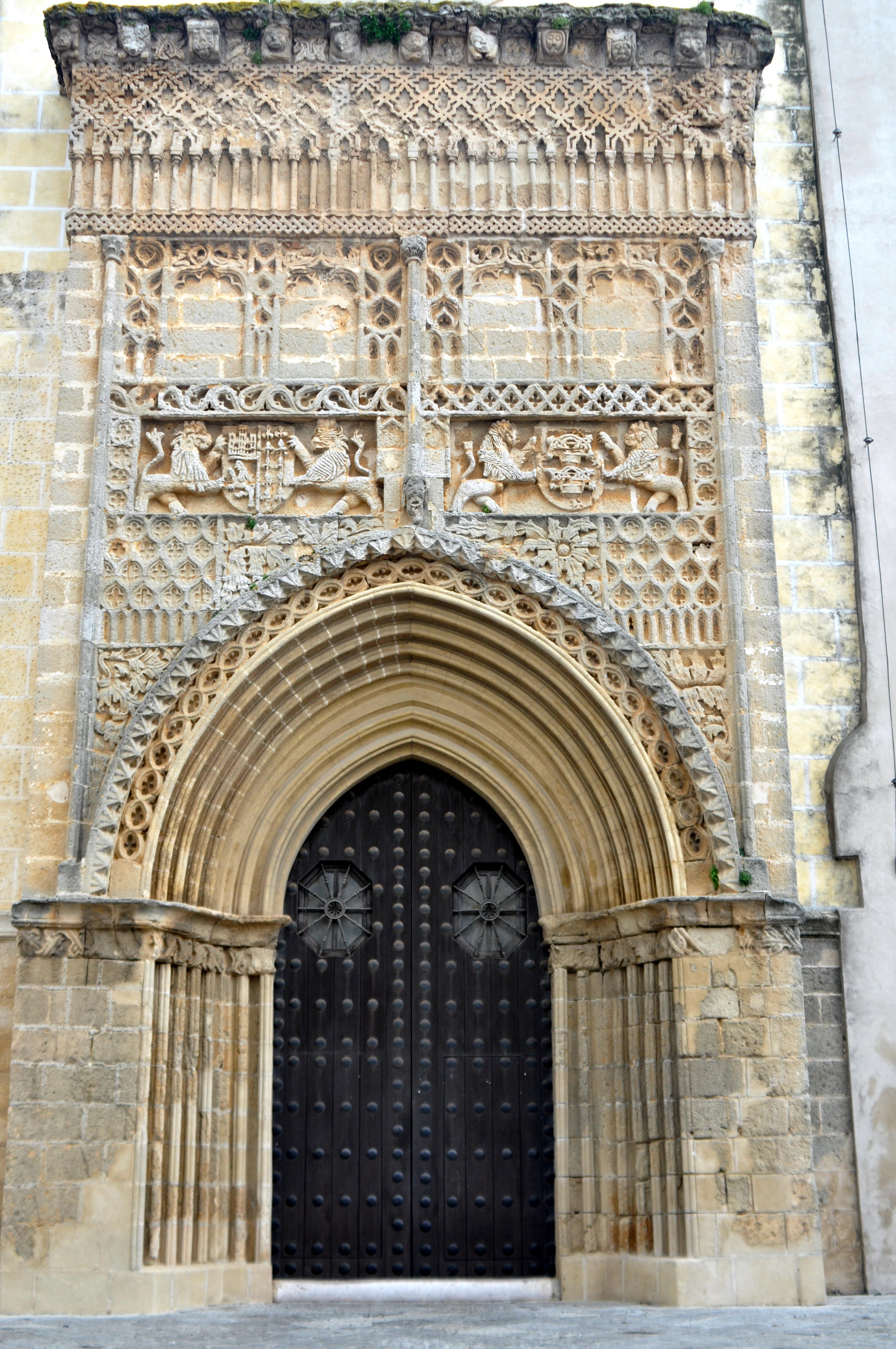 Portada mudéjar de la parroquia de Nuestra Señora de la O. Sanlúcar de Barrameda (Cádiz, España).